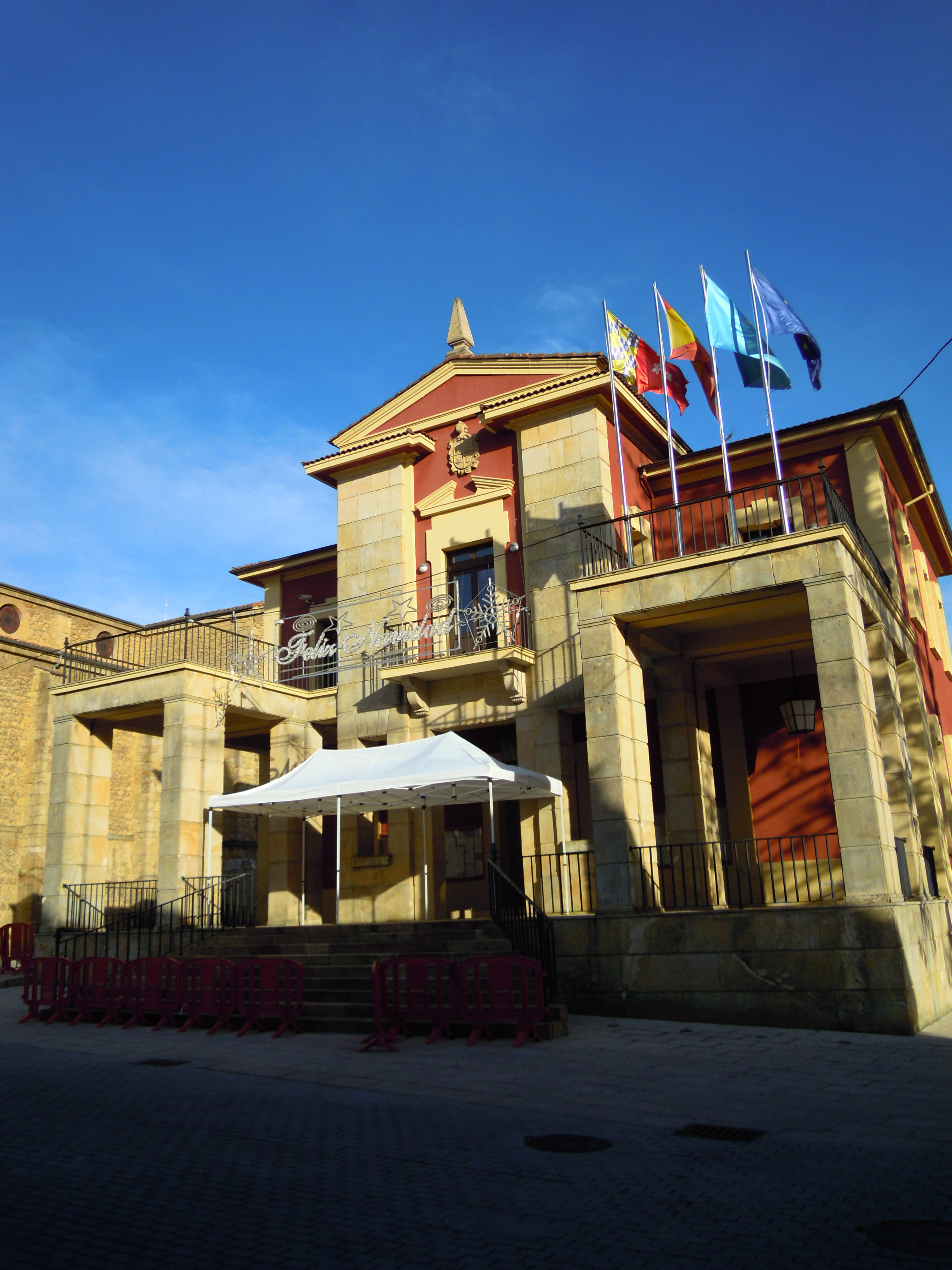 Casa conceyu de Nava